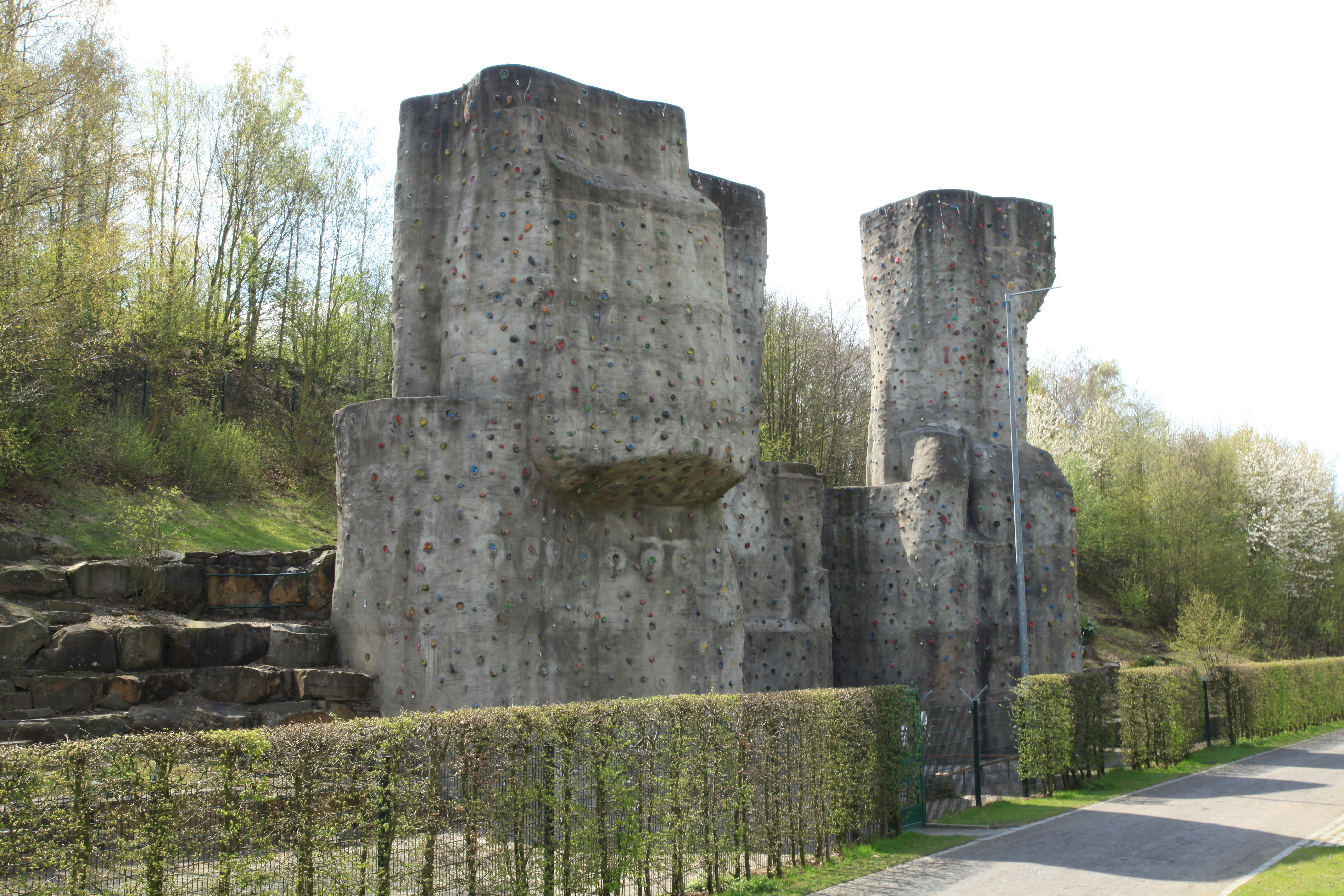 Gitternetzbrücke im Nordsternpark in Gelsenkirchen